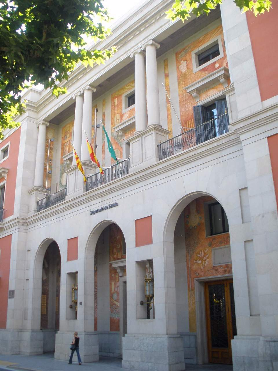 Lérida: Palau de la Diputació.